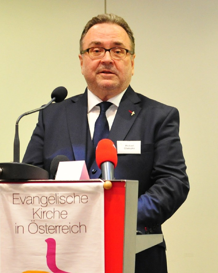 190504_SynodeBischofswahl_epdUschmann_262